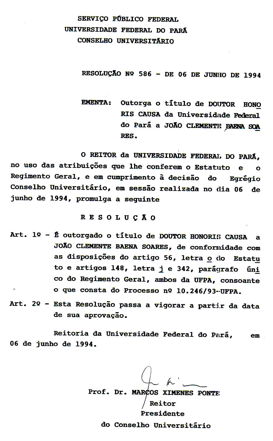 Resolução da Universidade Federal do Pará que confere a João Clemente Baena Soares o título de Doutor Honoris causa.